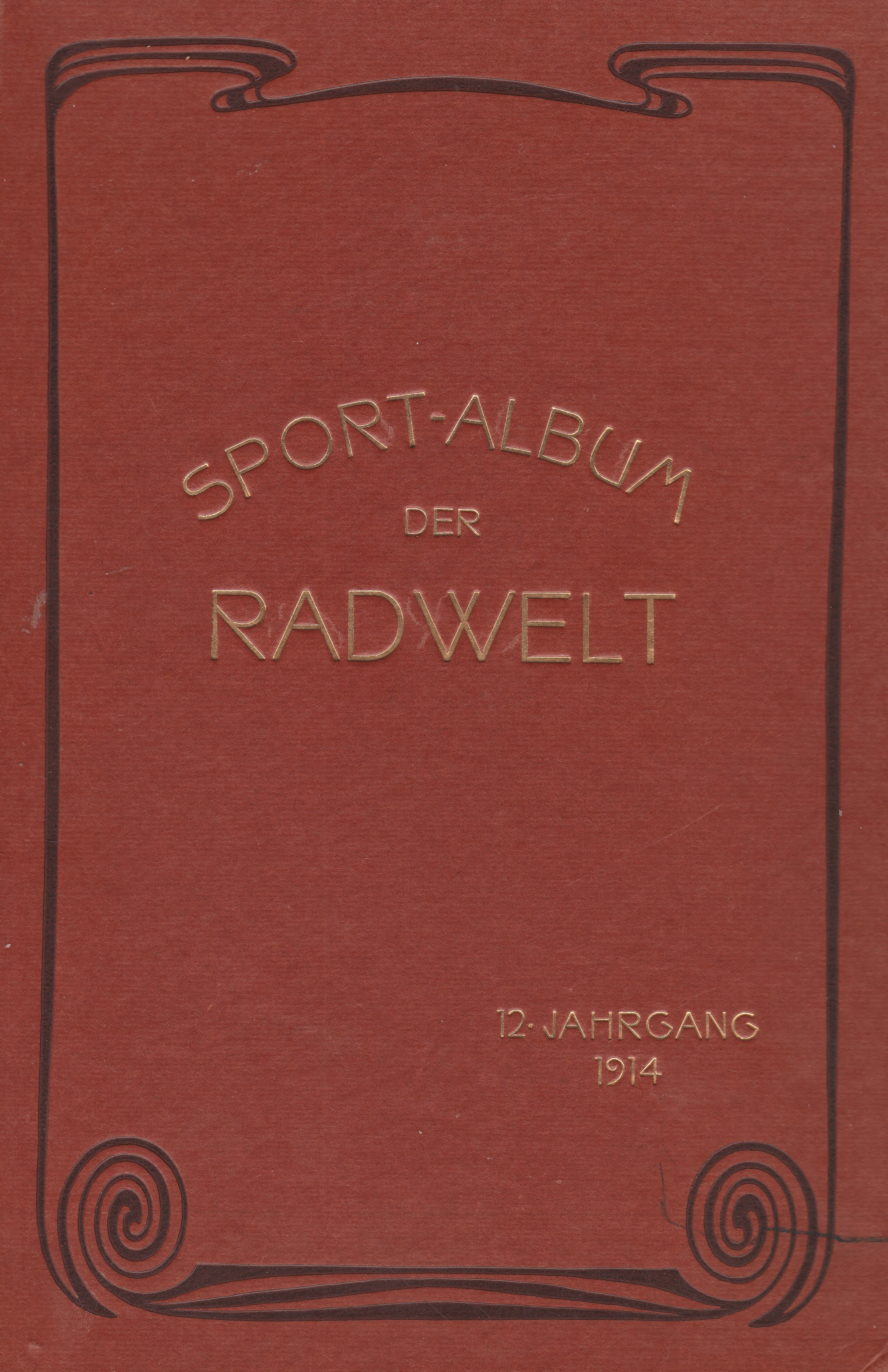 Sport-Album der Rad-Welt, Buchdeckel